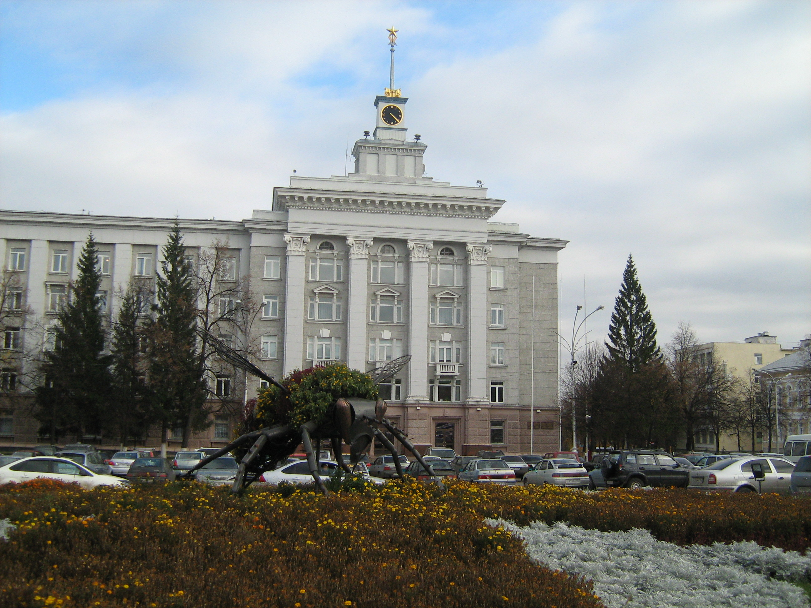 Минсельхоз Уфа